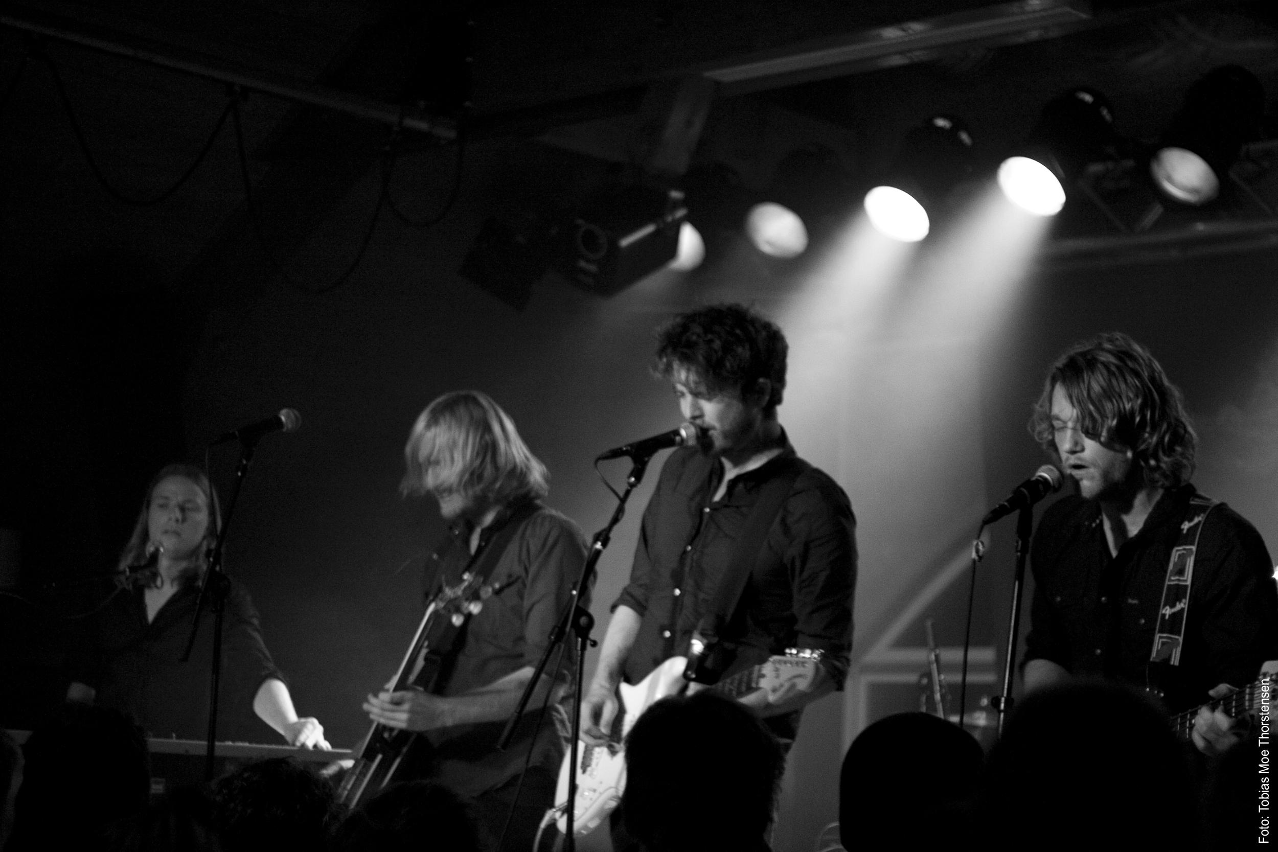 Bilde fra Grand Island konsert. Tatt av: Tobias Moe Thorstensen.